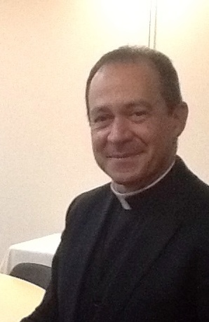 Συνάντηση του Υφυπουργού Εξωτερικών, Γιάννη Αμανατίδη, με τον Υφυπουργό Εξωτερικών της Αγίας Έδρας, Mons. Antoine Camilleri